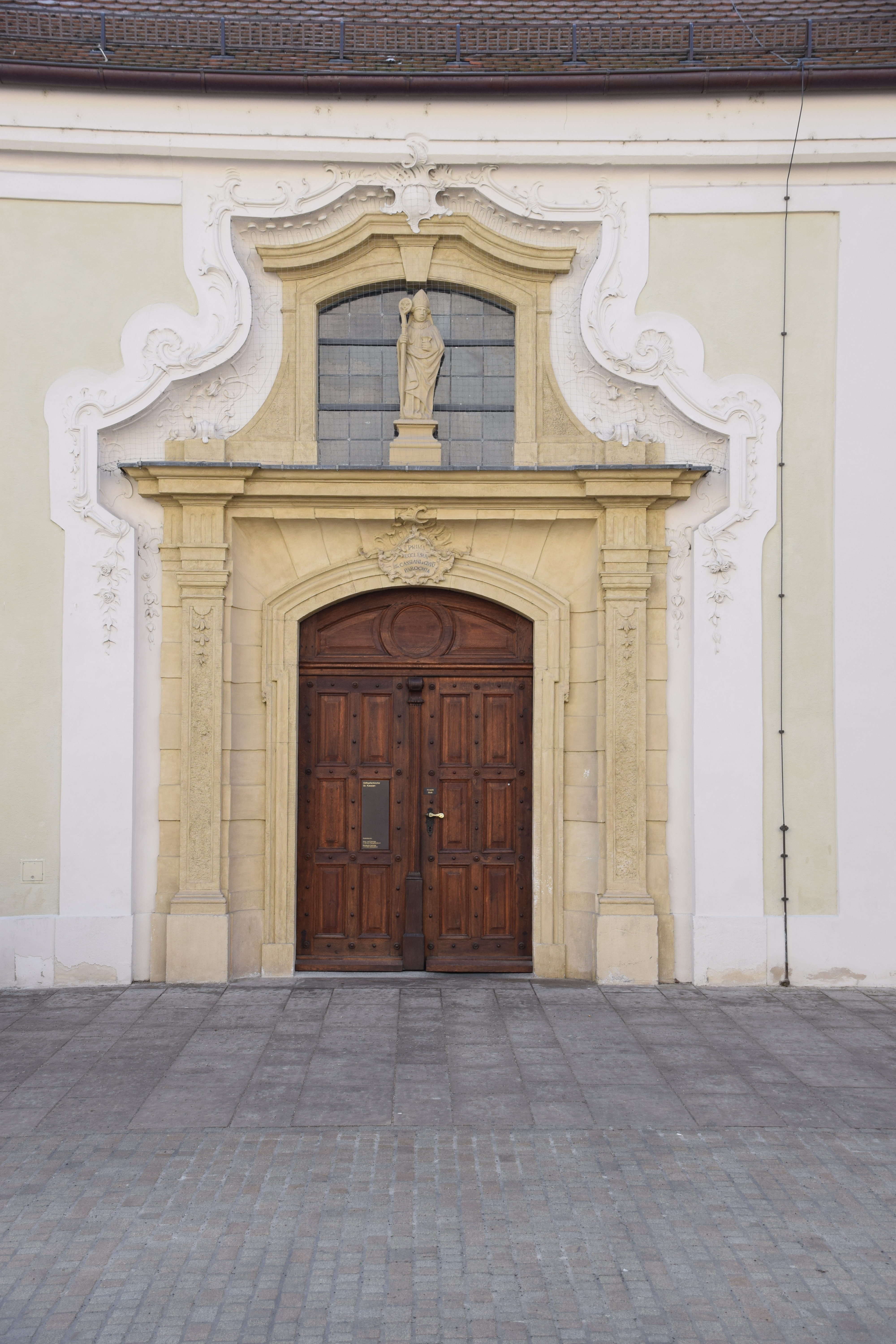 Nordportal der Stiftspfarrkirche St. Kassian in Regensburg